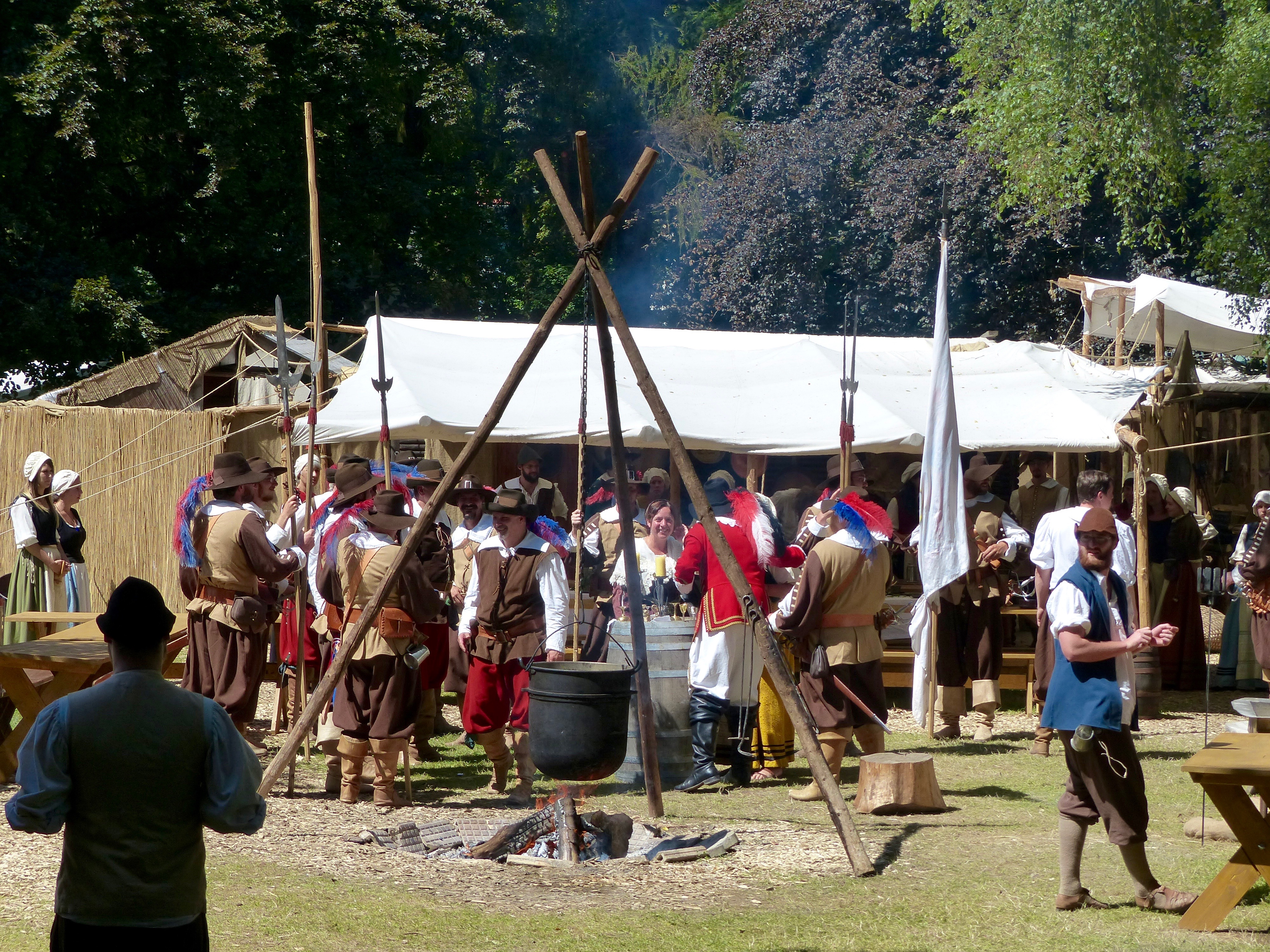 Grimmelschanze: Besuch Wallensteins Leibwache bei den Beutelschneidern